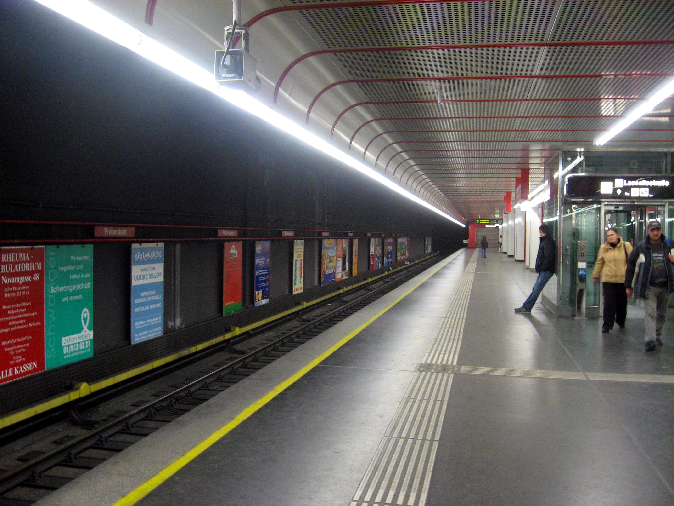 Stanice metra Praterstern